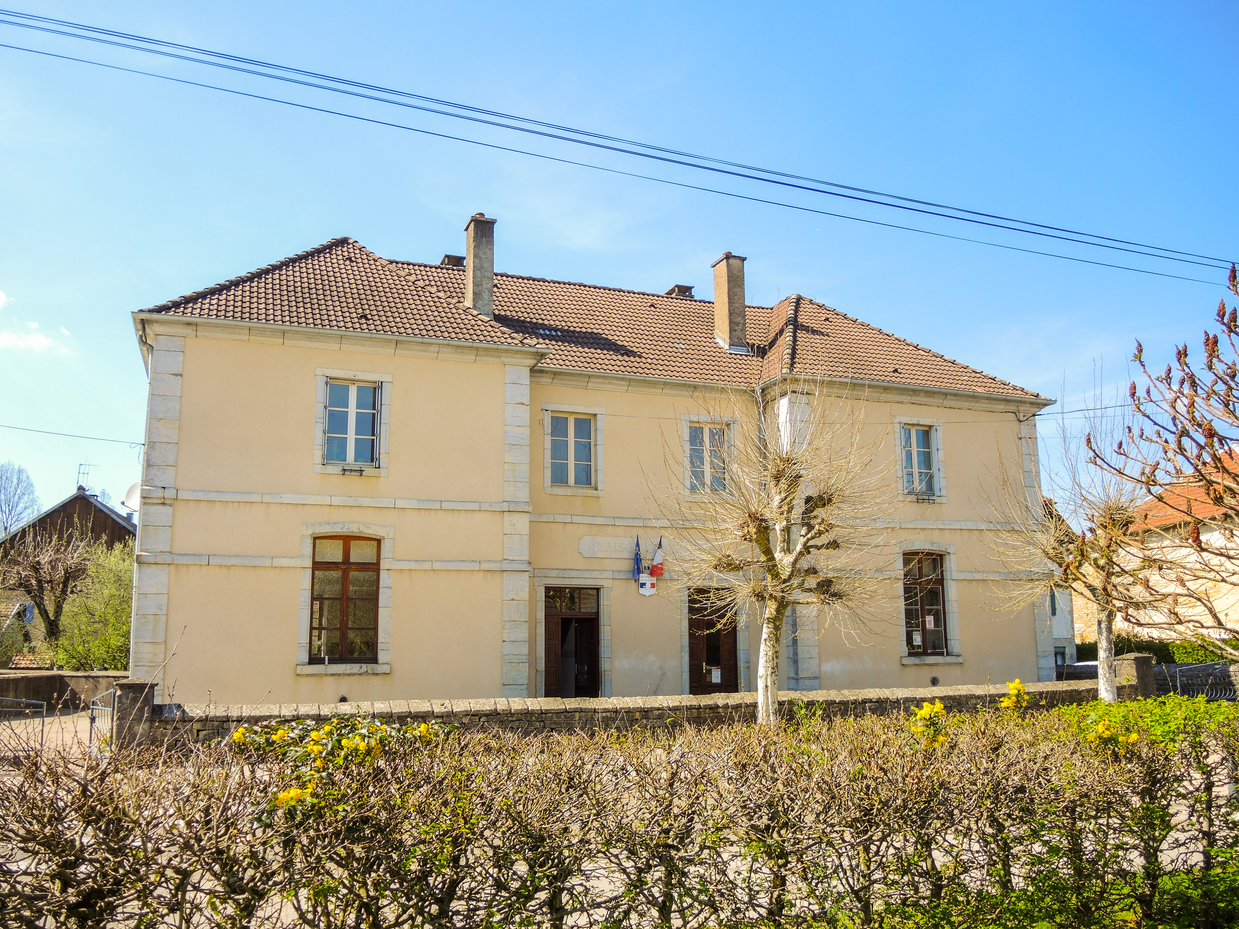 Facade de la mairie de Glamondans. Doubs